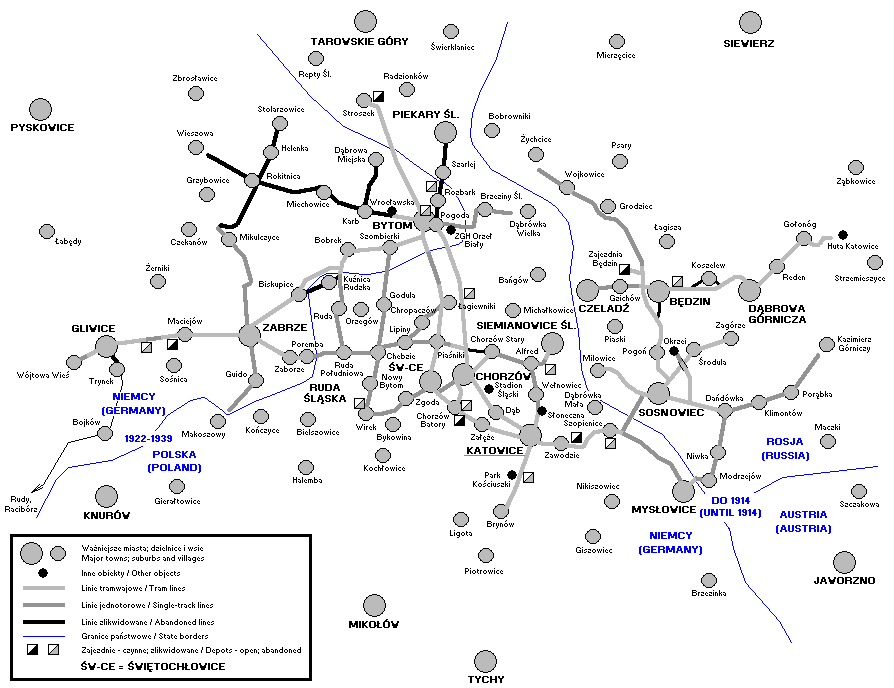 Silesian Interurbans network